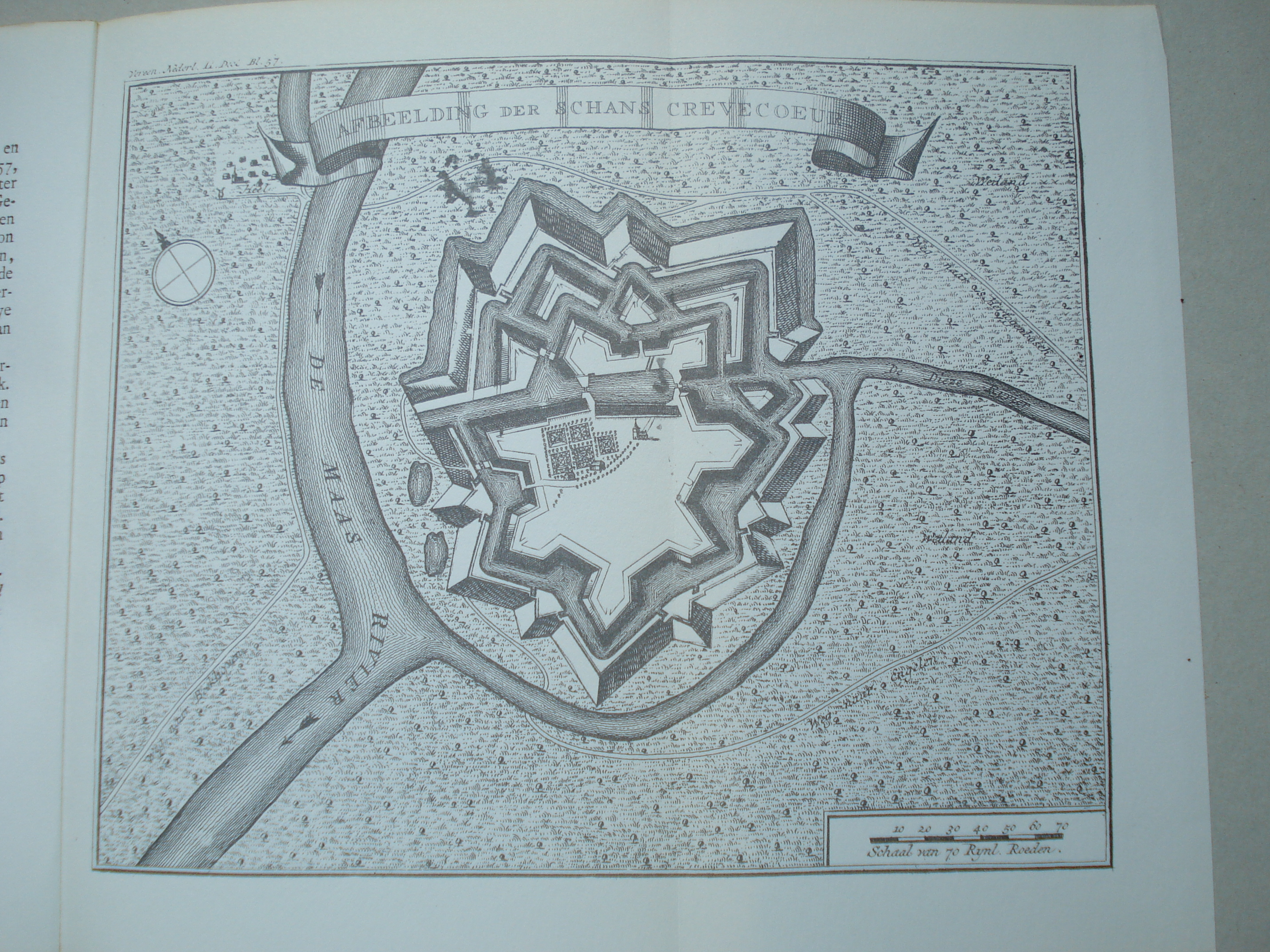 Schans Crevecoeur